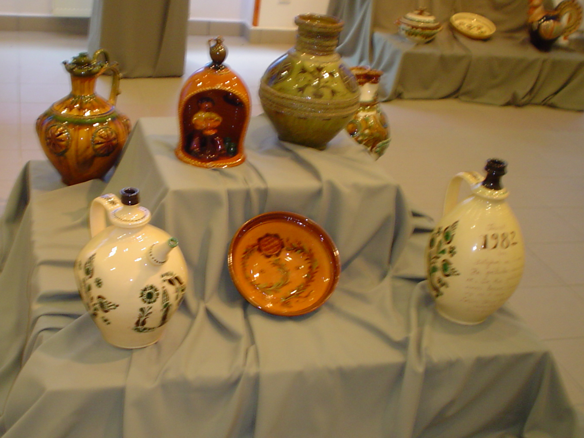 A Tiszazugi Földrajzi Múzeum kiállítási anyagának egy része (Tiszaföldvár, Jász-Nagykun-Szolnok megye, Magyarország)